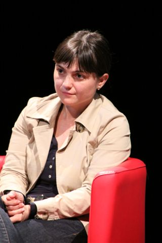 L'europarlamentare italiana Debora Serracchiani